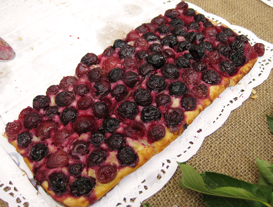 Cherry Coca from la Salzadella, Baix Maestrat, Valencian COuntry, Spain. Coca de cirera de la Salzadella, Baix Maestrat, País Valencià.